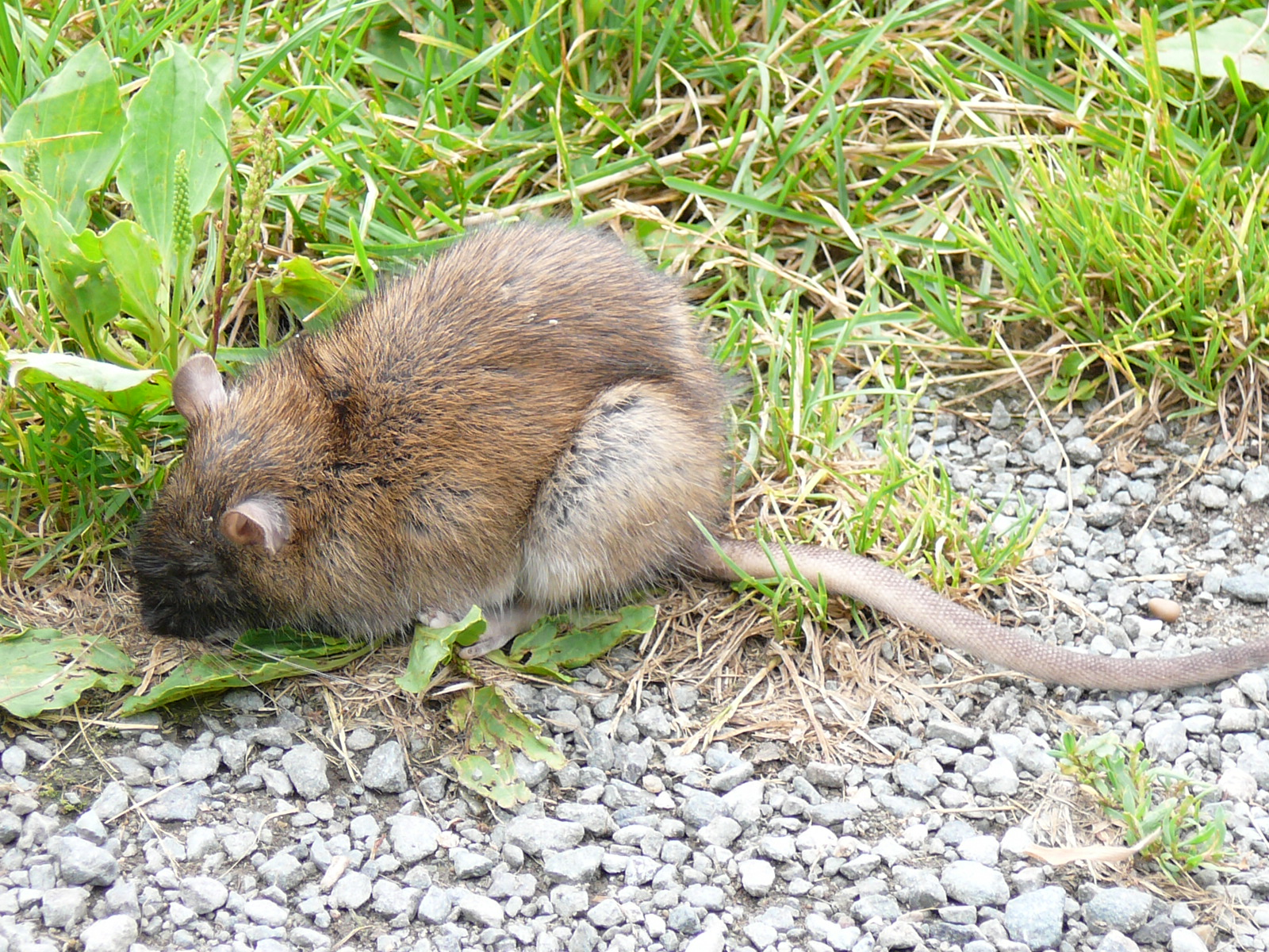 Rattus norvegicus, Rat brun, sumulot, un peu choqué, au bord d'une route de campagne près de Rochefort, 17,(France).